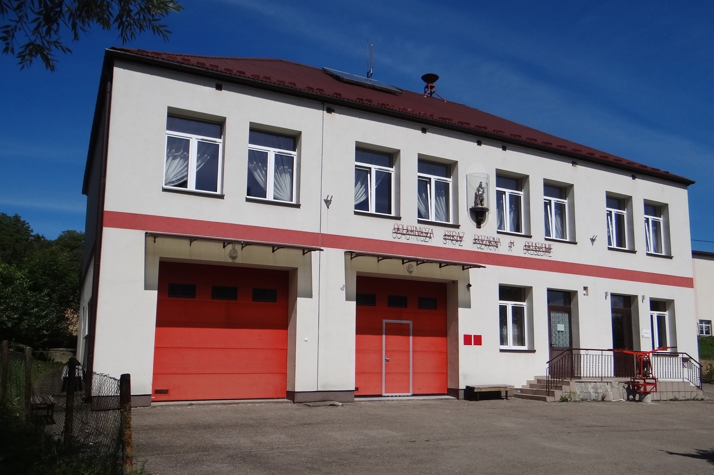 Gruszów (powiat myślenicki. Remiza OSP)